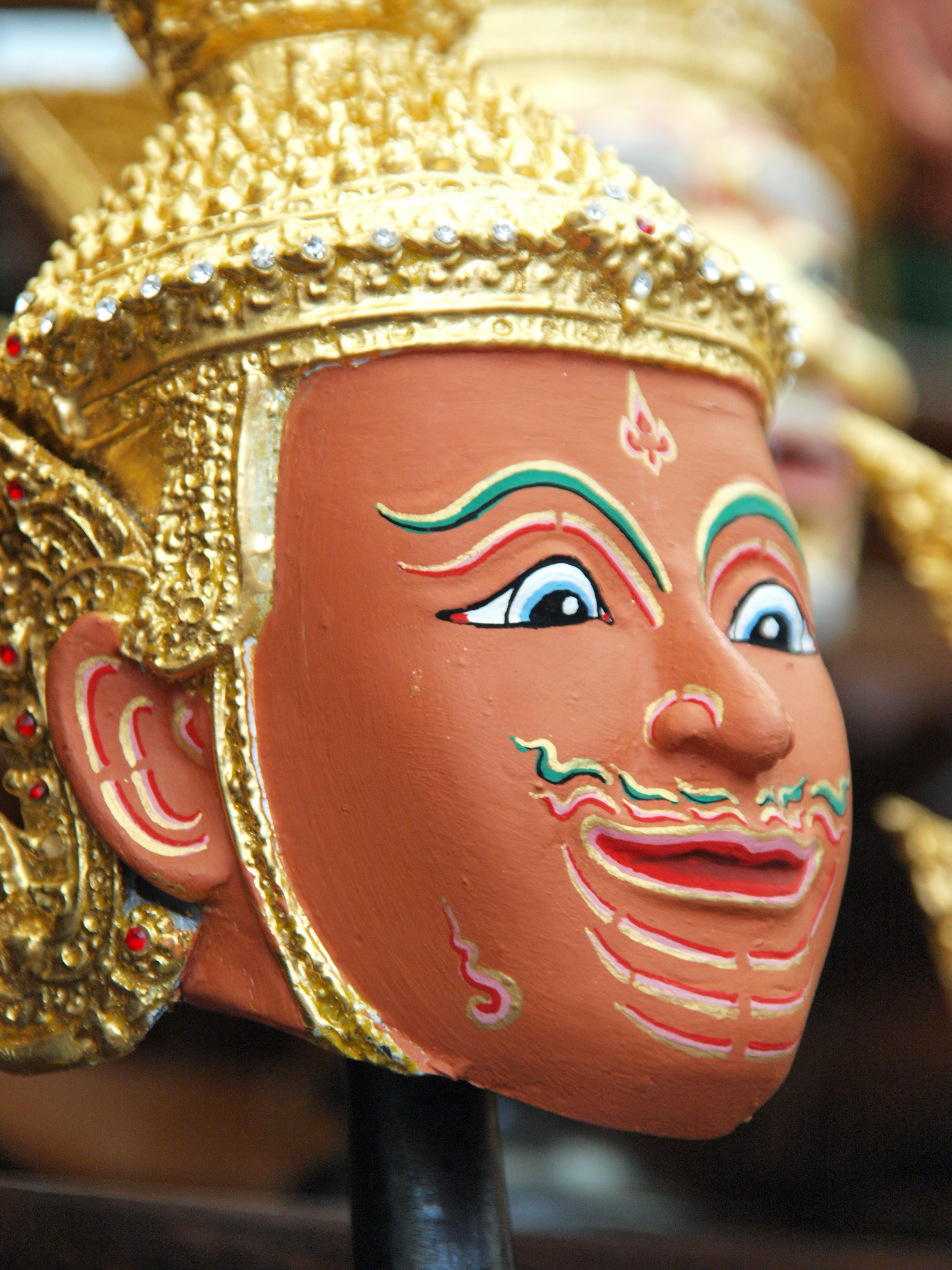 ภาพถ่ายหัวโขนฝ่ายเทวดา ถ่ายจากงาน "กรุงเทพฯ ถนนวัฒนธรรม" ของดีเขตบางพลัด ระหว่างวันที่ 1-5 กันยายน 2553